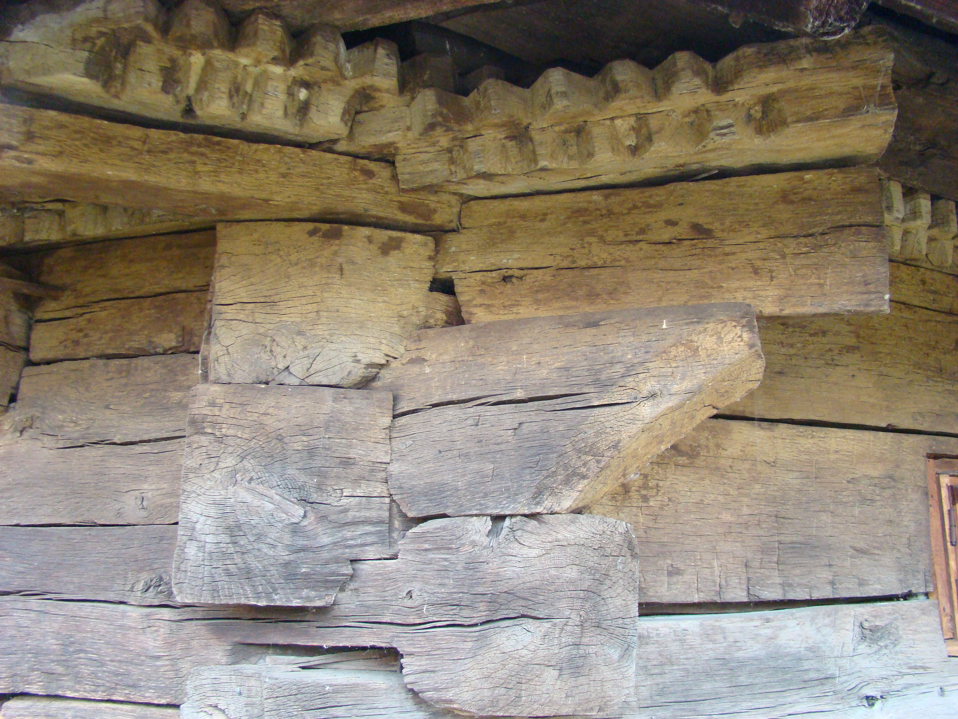 Biserica de lemn „Intrarea în Biserică” din Stâncești-Larga, Gorj